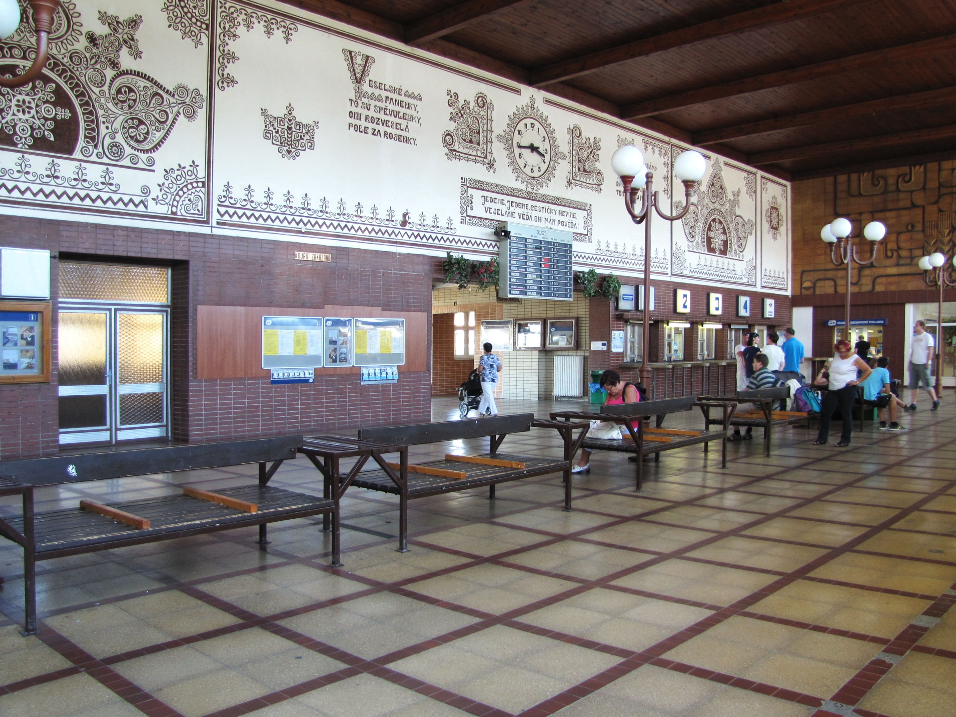 Nádražní hala ve Veselí nad Moravou